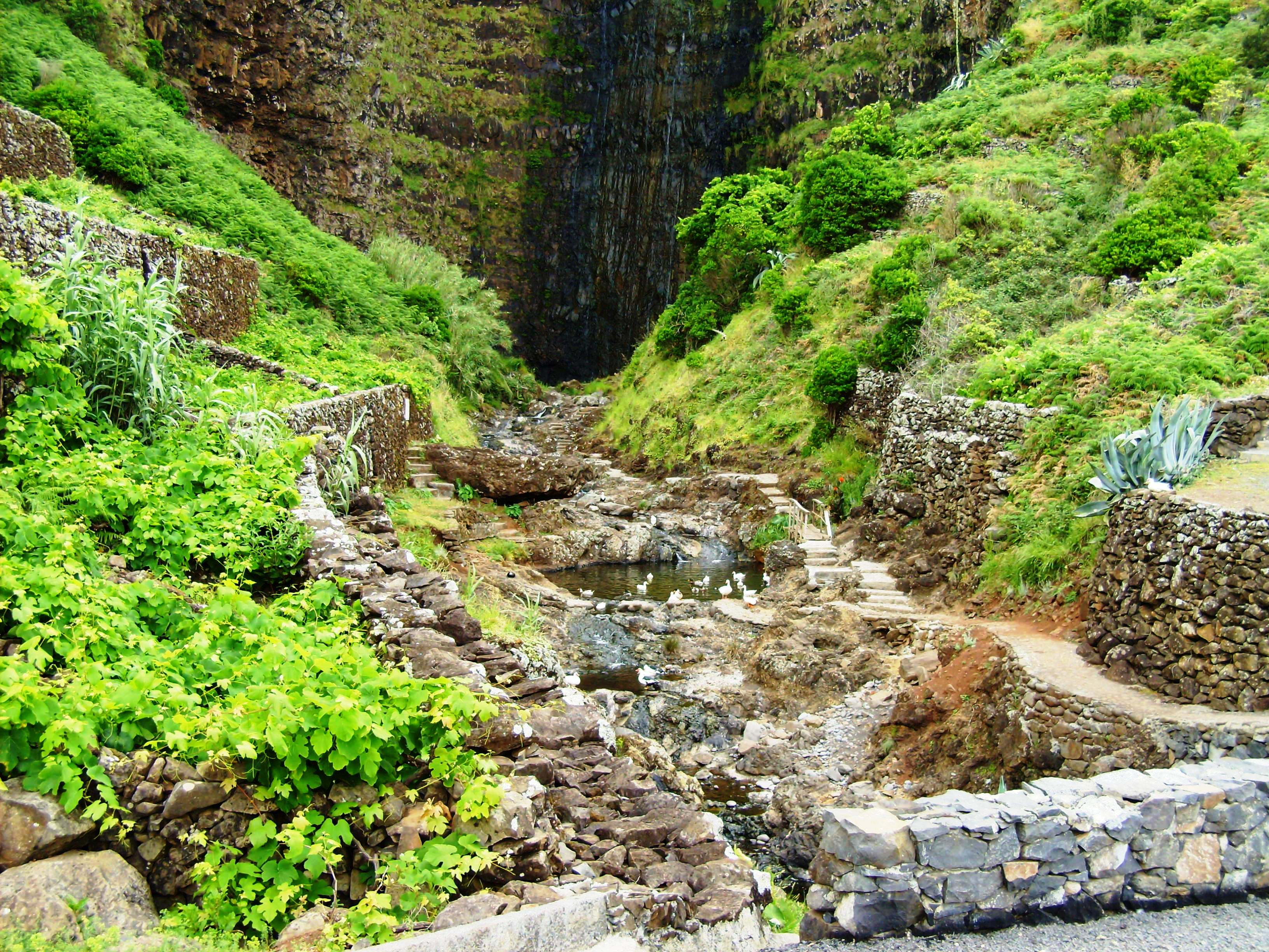 Lagar de Diogo Santos Faleiro, Ilha de Santa Maria (Açores), Portugal.